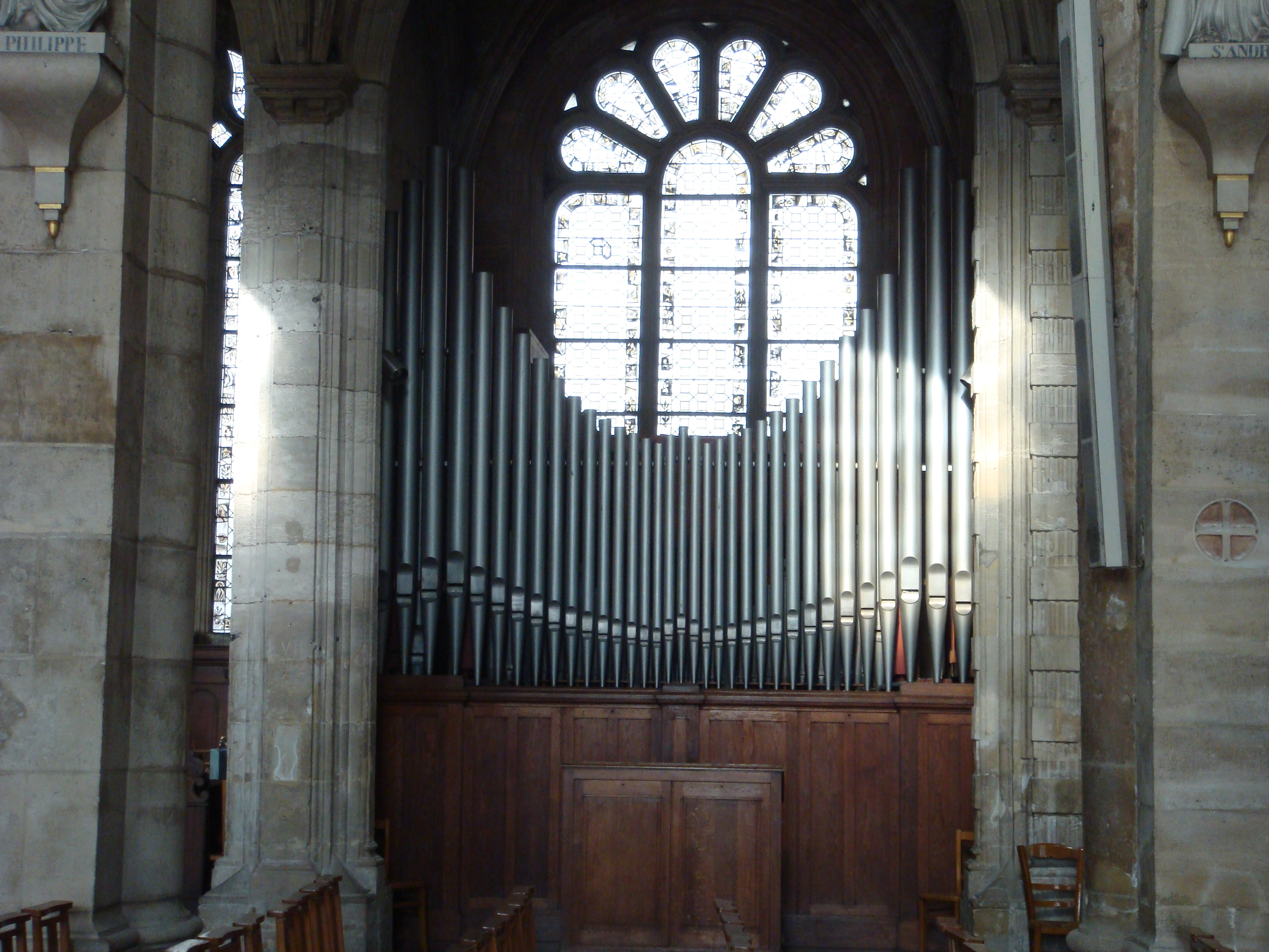 Orgue de chœur,cathédrale Notre-Dame du Havre, dans une ancienne chapelle du bas-côté nord.